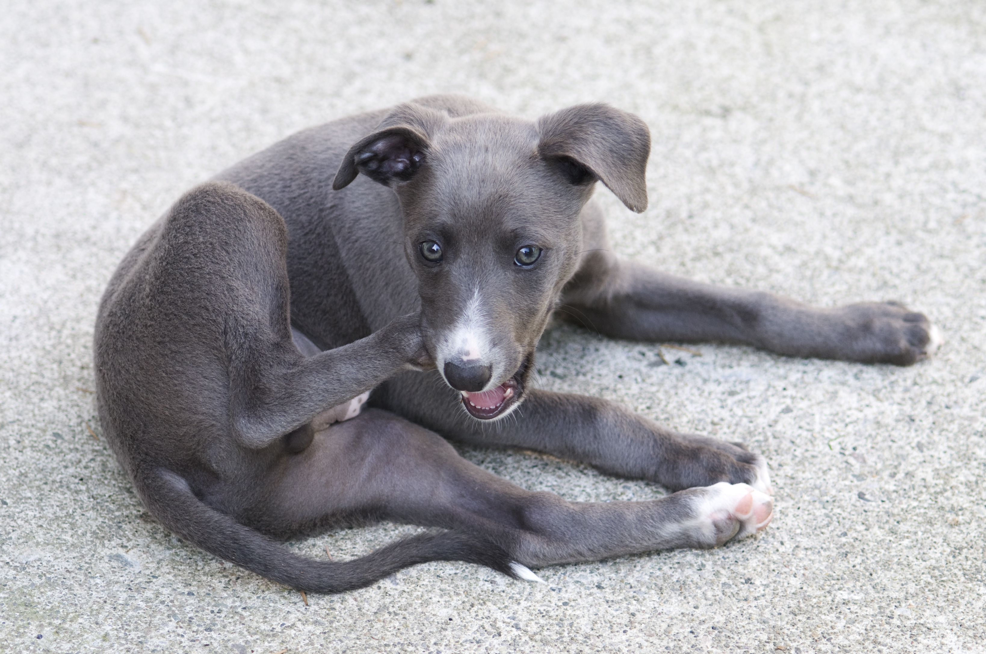 Merckx.